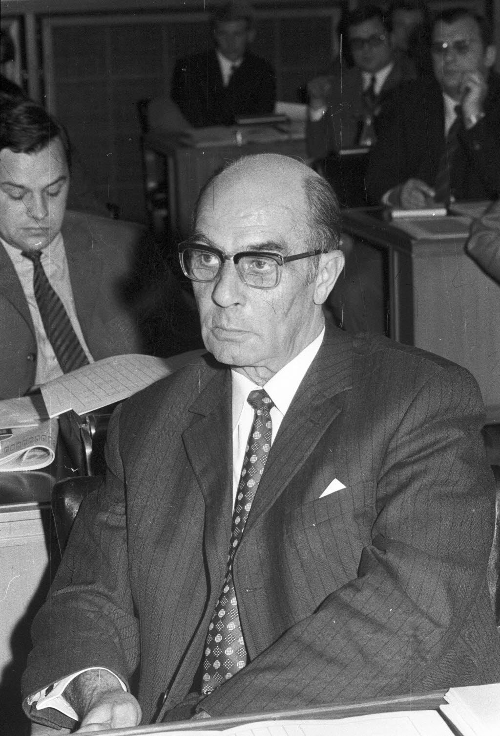 in der Ratssitzung vom Oktober. Hinten links Ratsherr Günter Kahlberg (CDU).